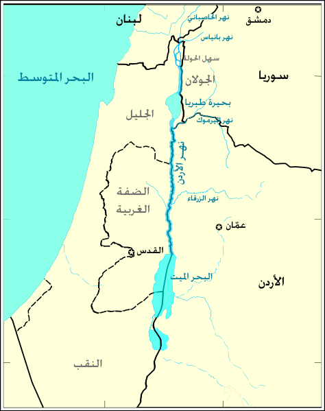 خريطة نهر الأردن في بلاد الشام وروافده وبحيراته